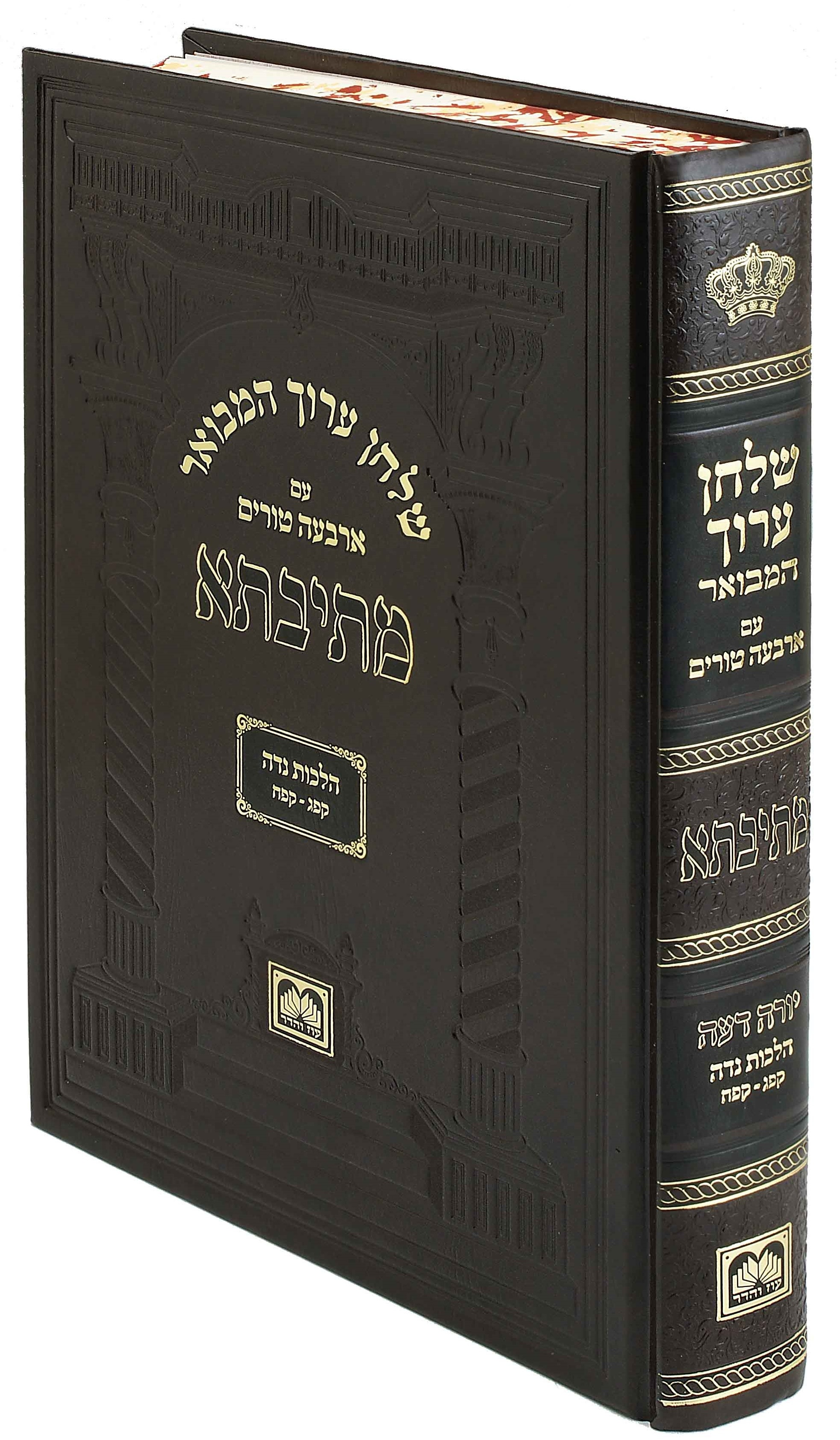 שולחן ערוך מתיבתא יורה דעה